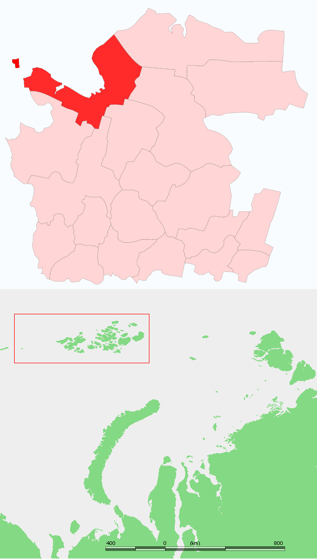 Приморский район Архангельской области, континентальная часть (сверху) и островная (Земля Франца-Иосифа и остров Виктория)